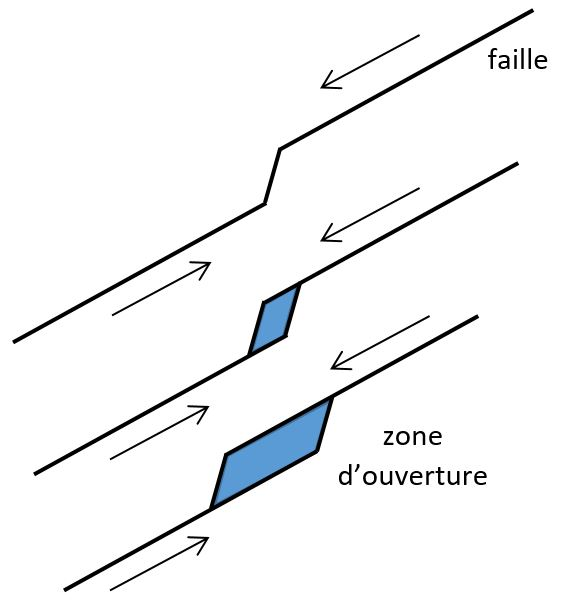 Système de failles transformantes avec pour conséquence l'ouverture d'un bassin sédimentaire dit : en pull-apart